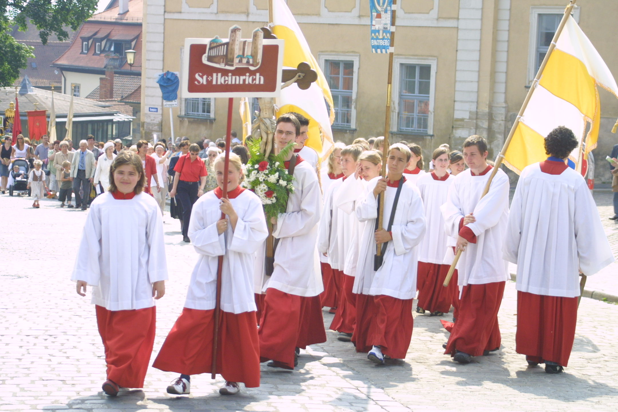 Fronleichnamsprozession Bamberg